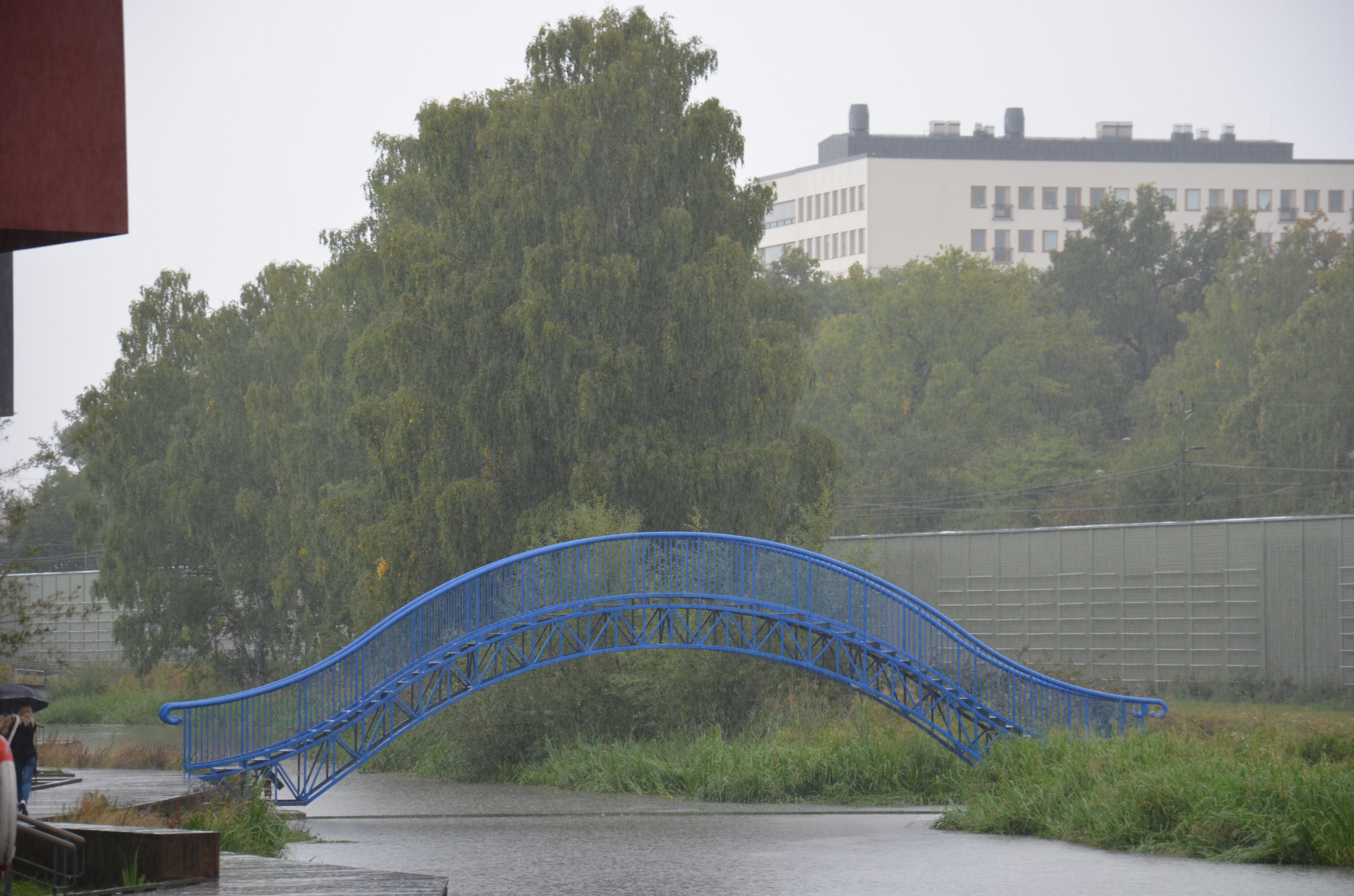 Konkret transcendens av Ebba Bohlin, Bällstaån, Annedal i Stoickholm